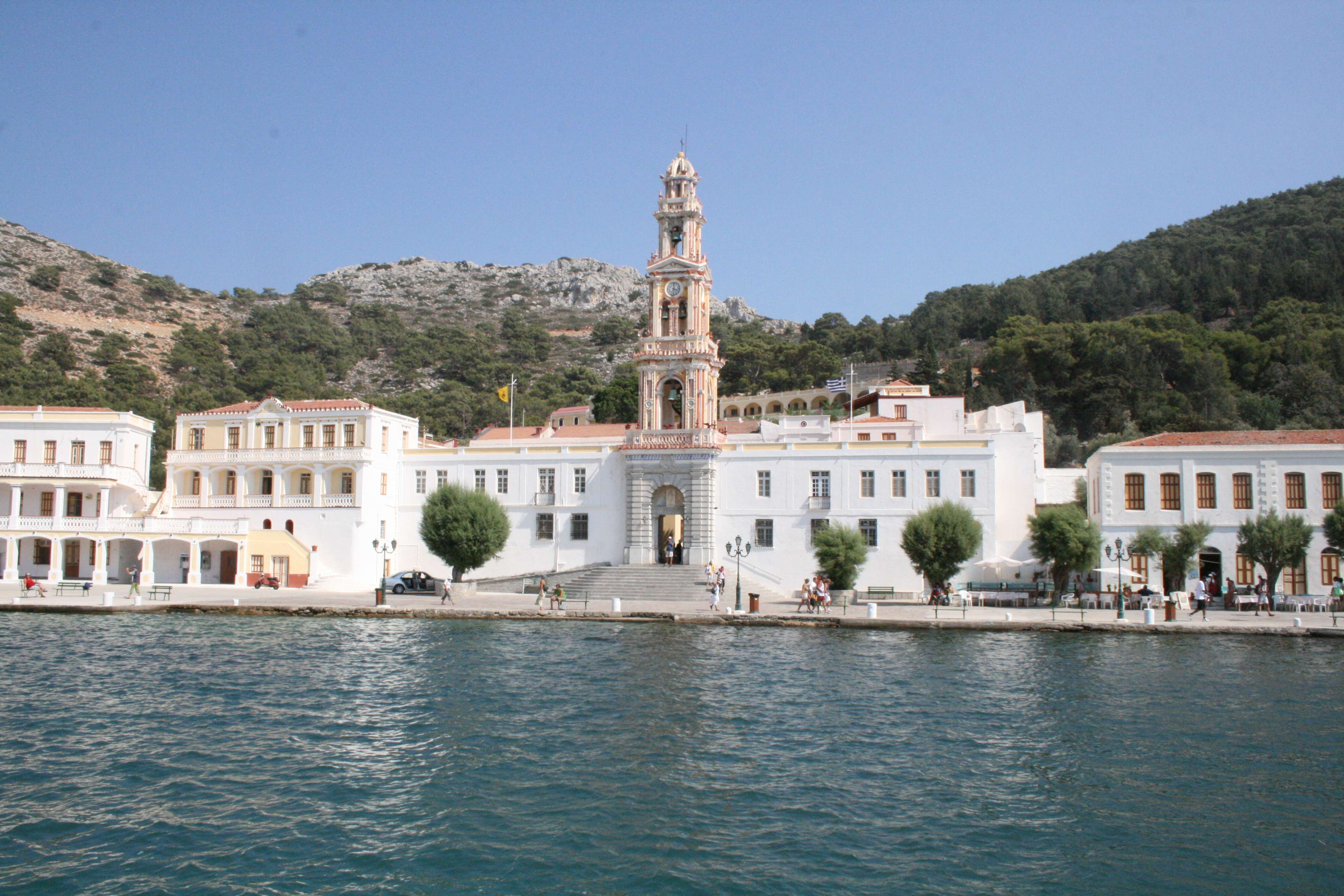 Isola di Simi: Monastero di San Michele Arcangelo